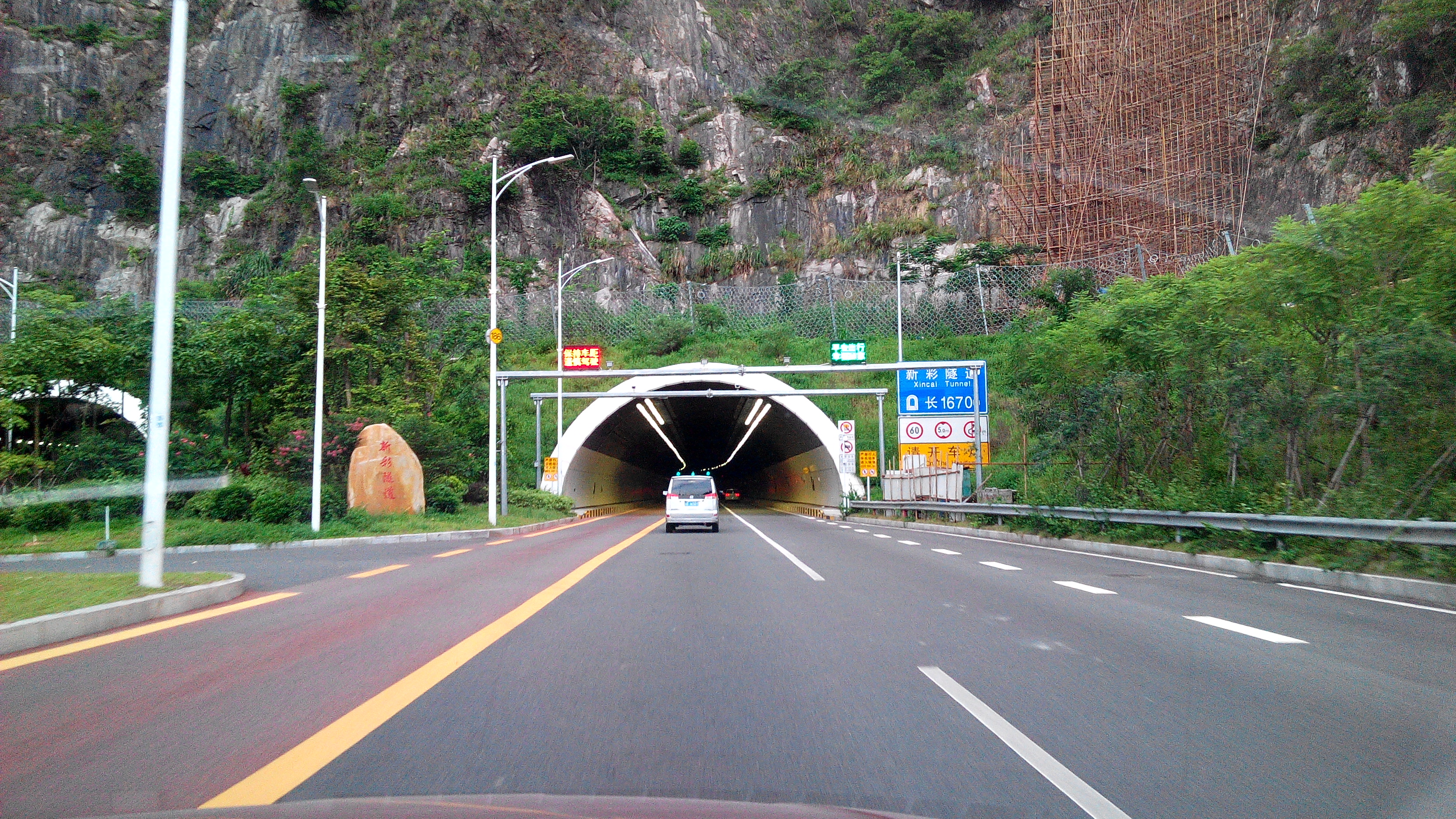 深圳市新彩通道 南端入口